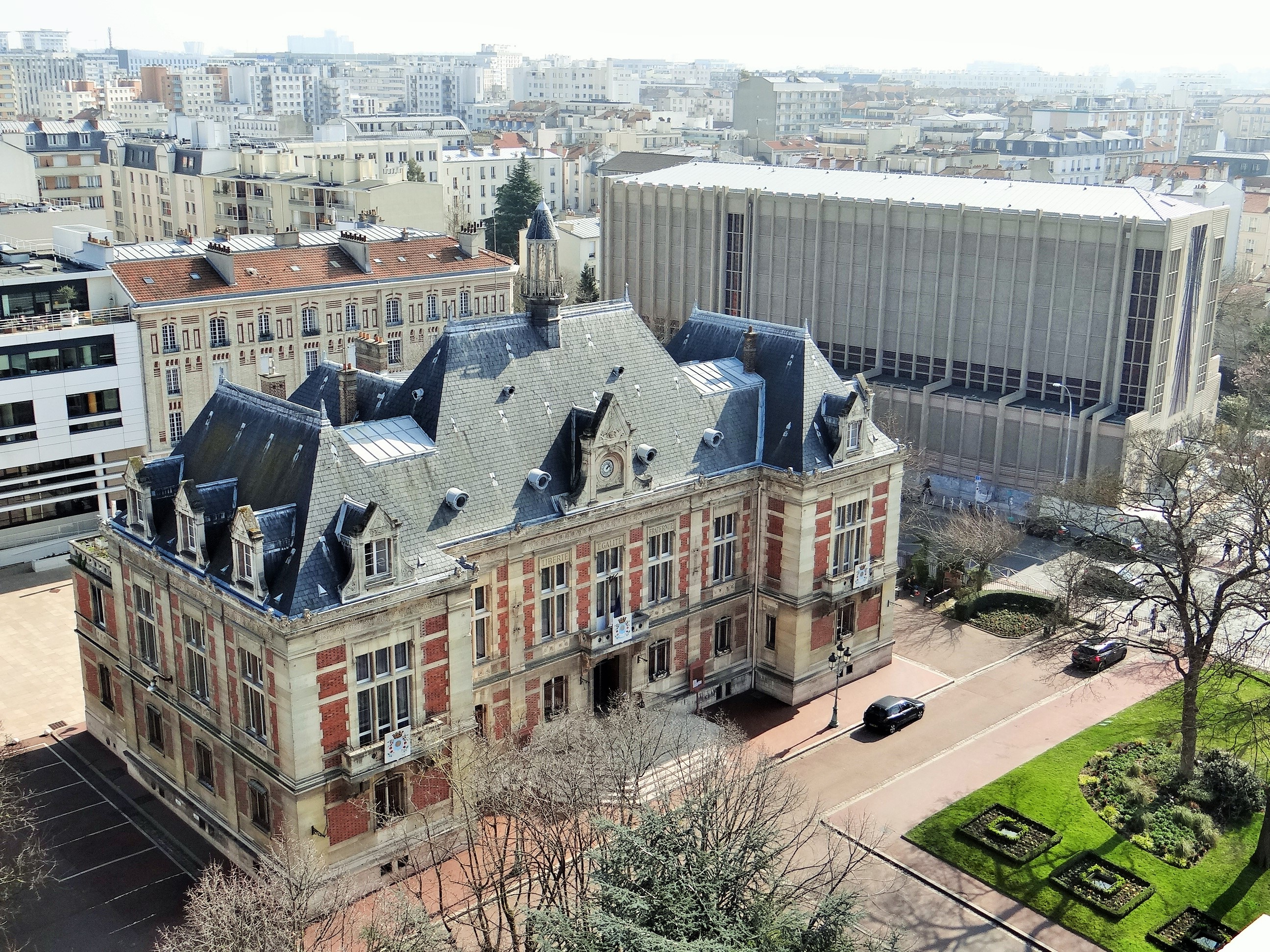 Mairie de Montrouge vue du Beffroi, et en arrière-plan, église Saint-Jacques le Majeur